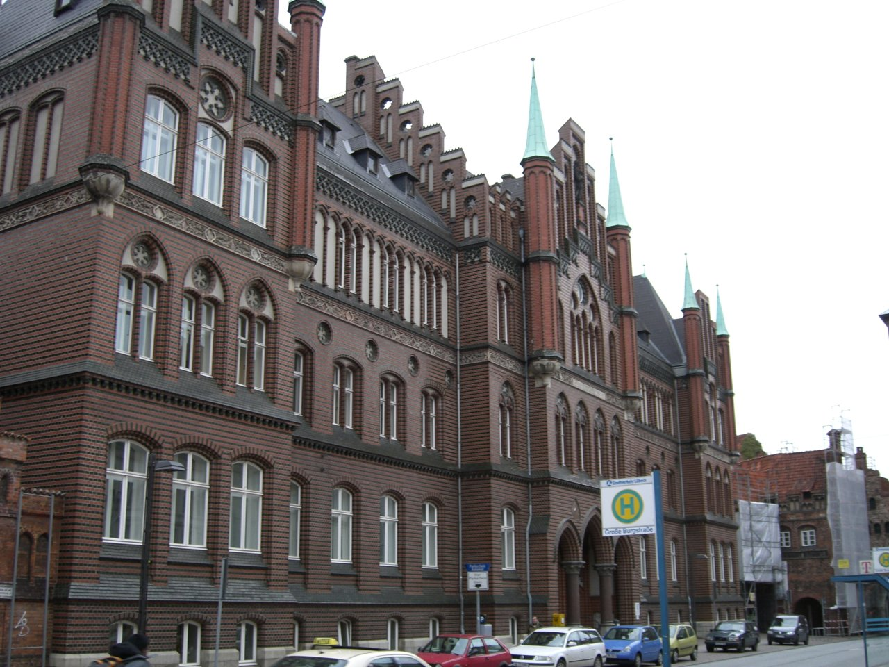 Altes Gerichtsgebäude in Lübeck (selbst aufgenommen)